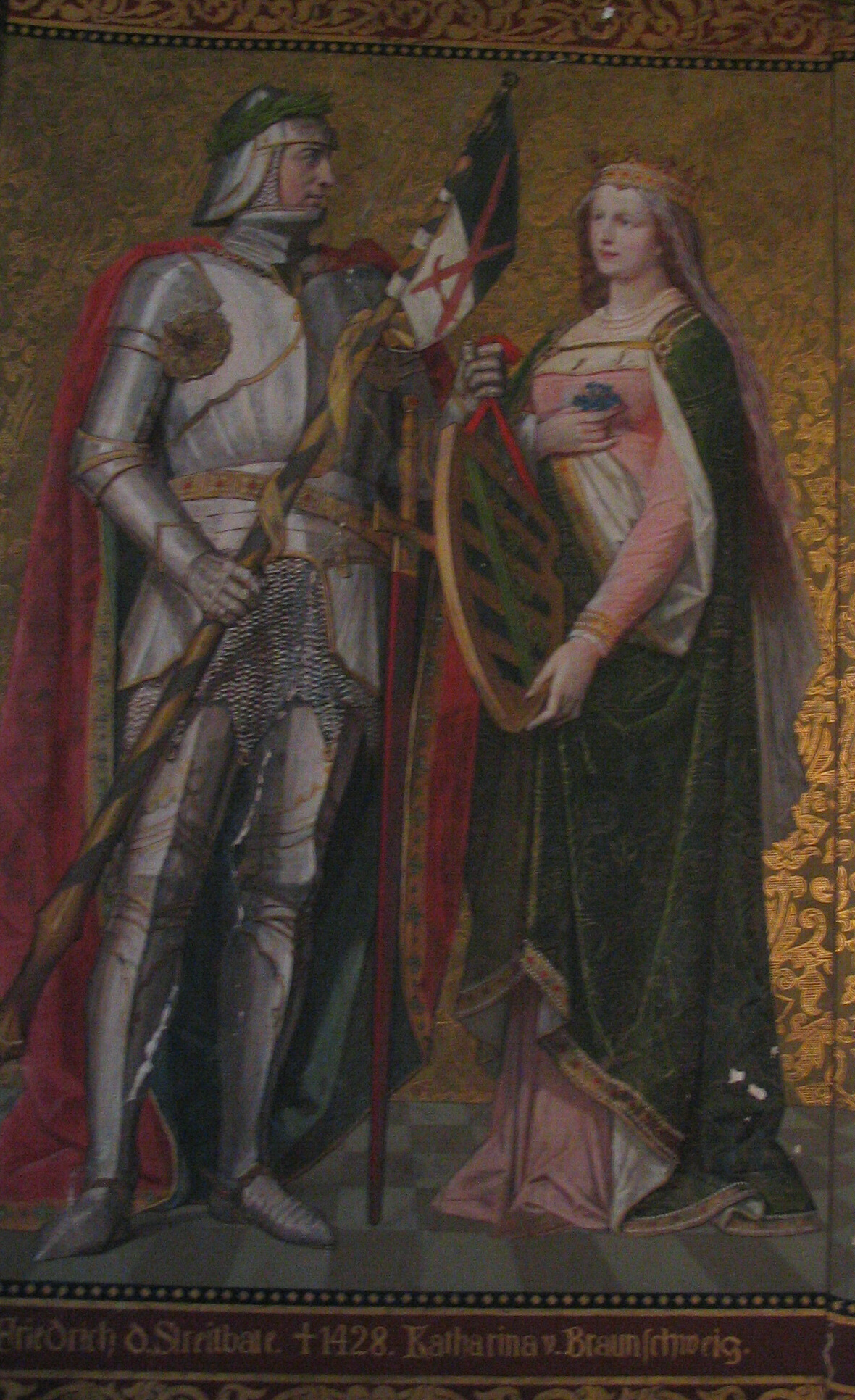 Foto eines Historiengemäldes aus dem 19. Jahrhundert in der Albrechtsburg Meißen: Friedrich der Streitbare und Katharina von Braunschweig.